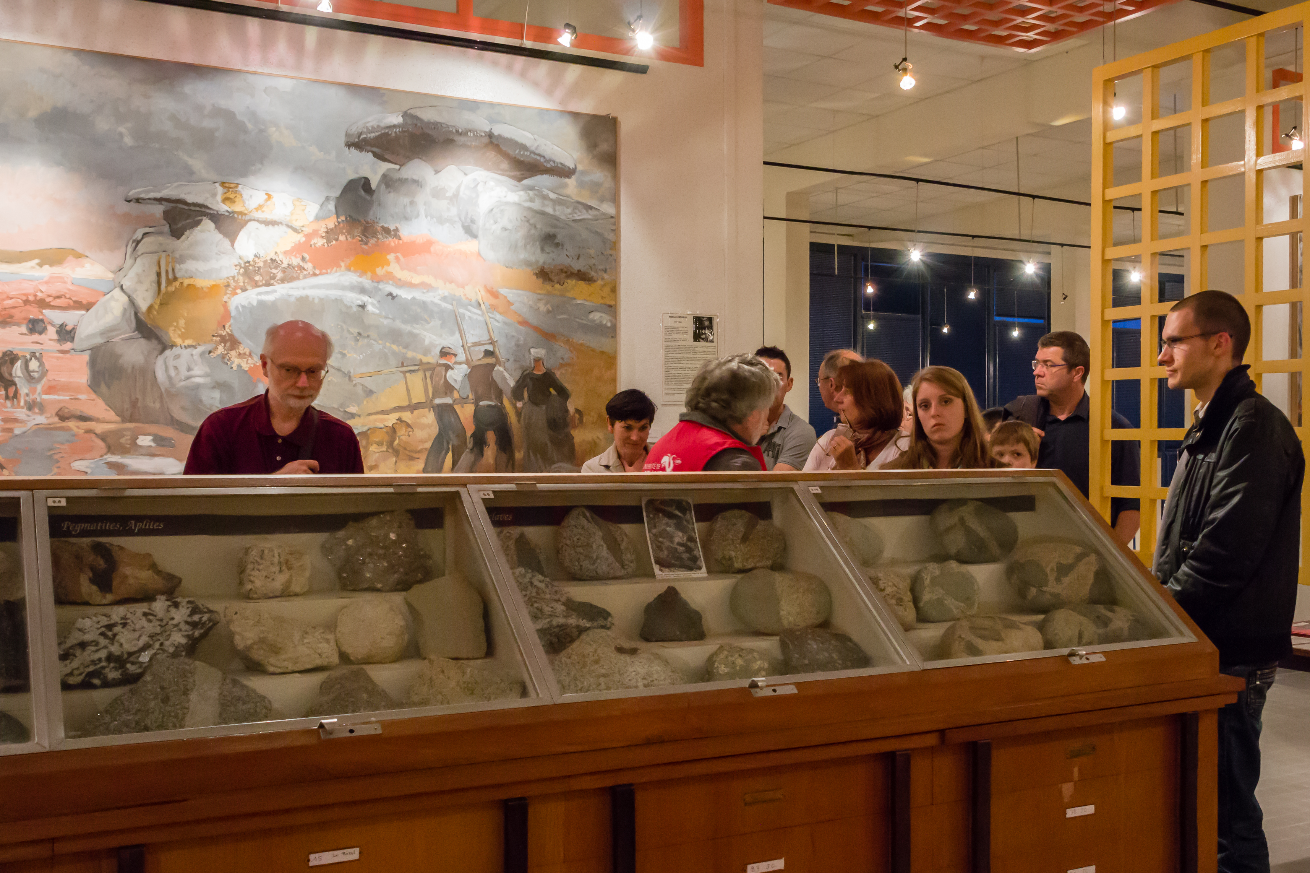 Visite du musée de géologie de l'Université de Rennes 1 lors de la Nuit européenne des musées en 2014.